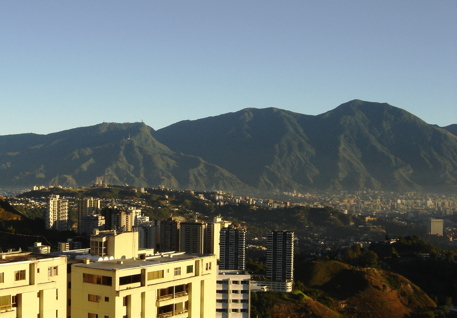 Cerro el Avila. Caracas, Venezuela.